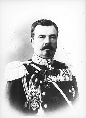 Иван Иванов Фичев: български военен деец Iwan Fitschew: bulgarischer Militär, Verteidigungsminister und Generalstabschef der Bulgarische Armee während des Ersten Balkankrieges. Ivan Fichev: Bulgarian general and chief of stuff of the Bulgaria Army during the First Balkan War